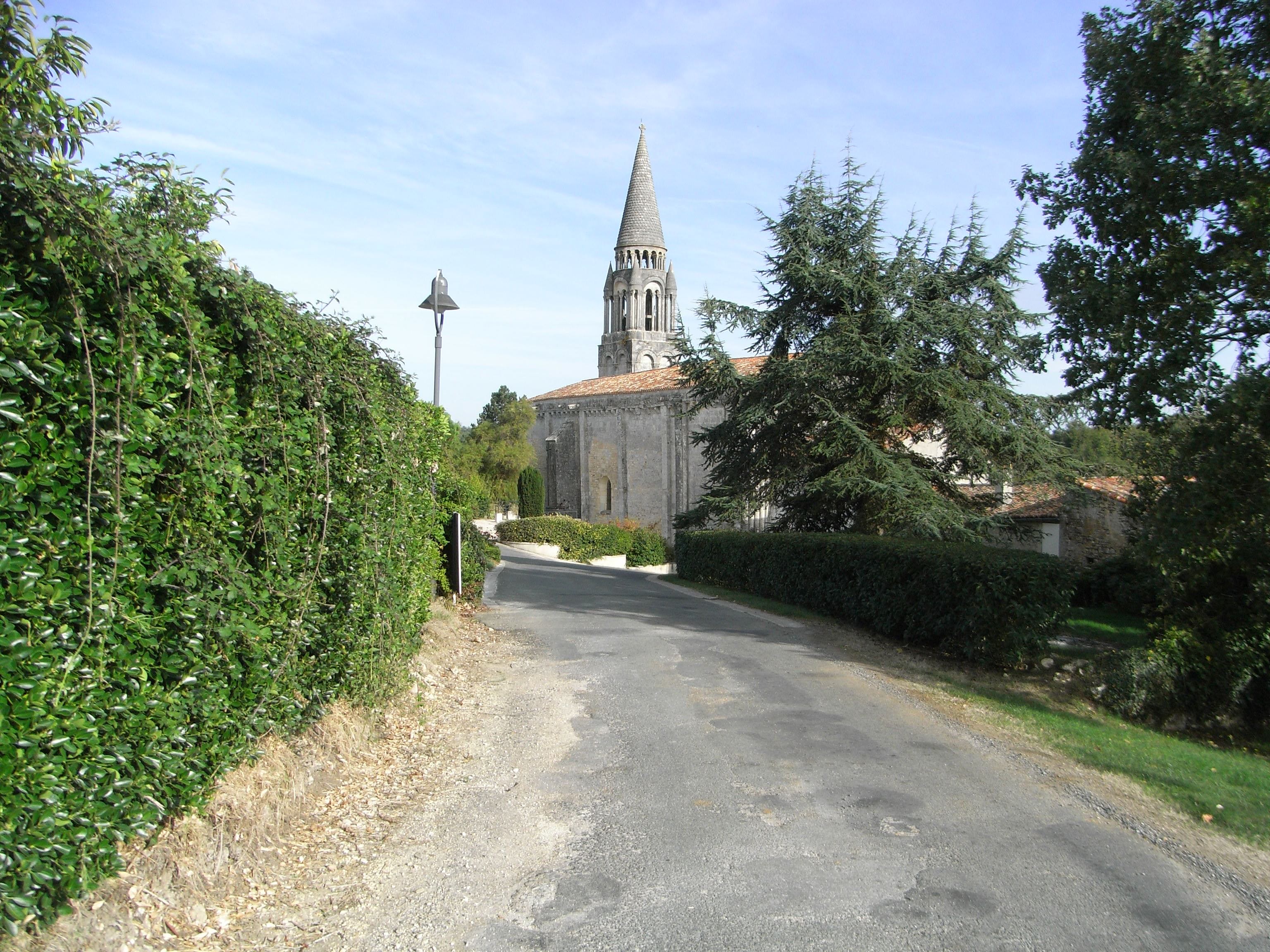 Église du IXème siècle à Fenioux en Charente-Maritime (France). Elle classée monument historique depuis 1840.